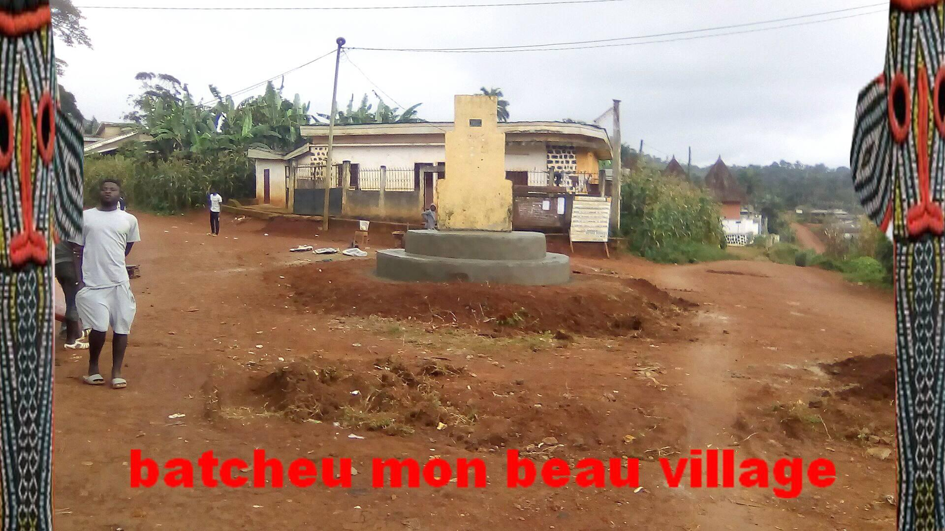 Carrefour Batcheu, Monument à la mémoire de Sa Majesté Ytembe Michel, Chef Superieur des Batcheu de 1913 à 1983